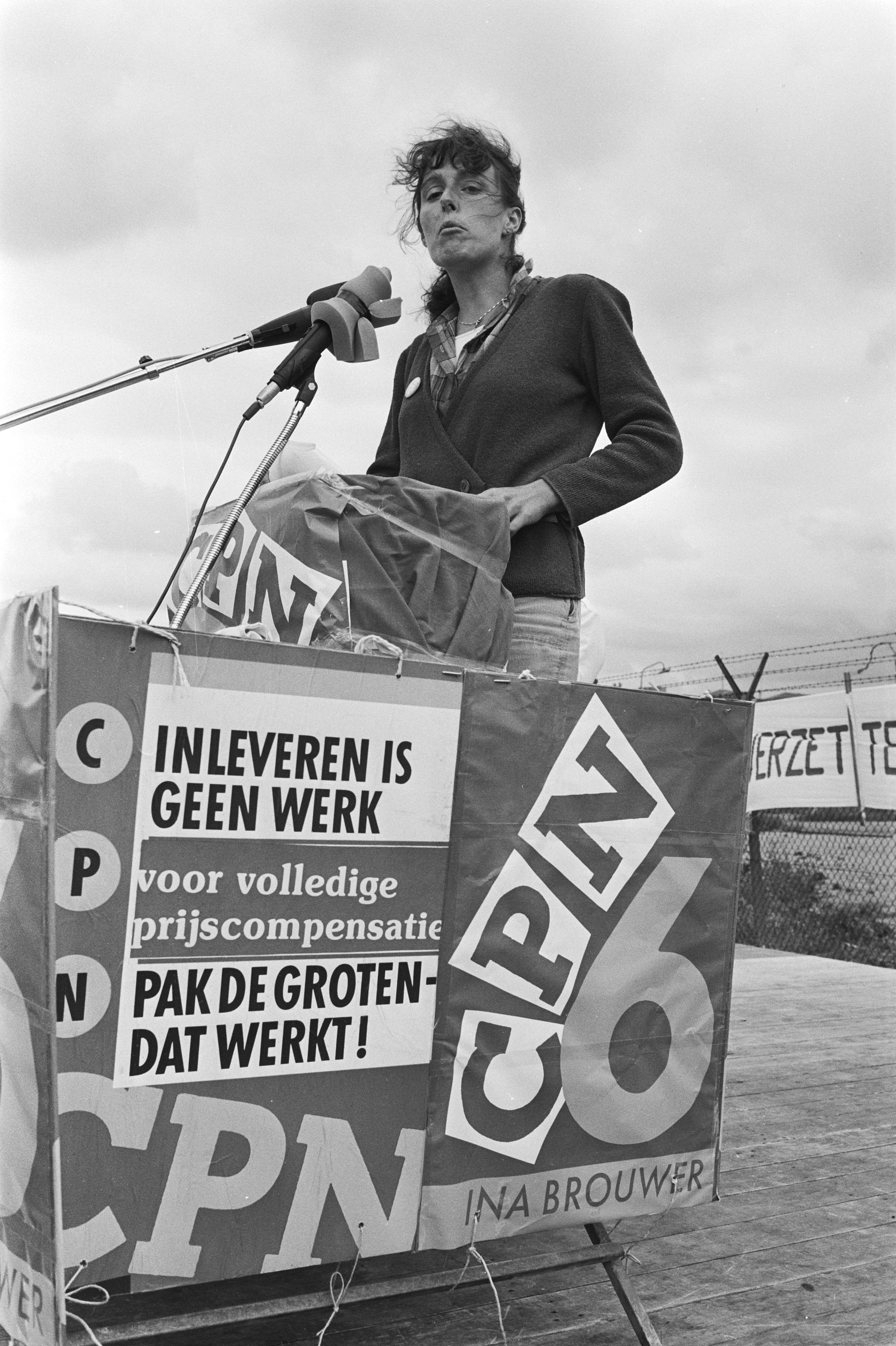 Collectie / Archief : Fotocollectie Anefo Reportage / Serie : Start verkiezingscampagne CPN bij ADM in Amsterdam; Beschrijving : Ina Brouwer tijdens toespraak Datum : 16 augustus 1982 Locatie : Amsterdam, Noord-Holland Trefwoorden : parlementariërs, politiek, toespraken, verkiezingscampagnes Persoonsnaam : Brouwer, Ina Instellingsnaam : ADM Fotograaf : Antonisse, Marcel / Anefo Auteursrechthebbende : Nationaal Archief Materiaalsoort : Negatief (zwart/wit) Nummer archiefinventaris : bekijk toegang 2.24.01.05 Bestanddeelnummer : 932-2806